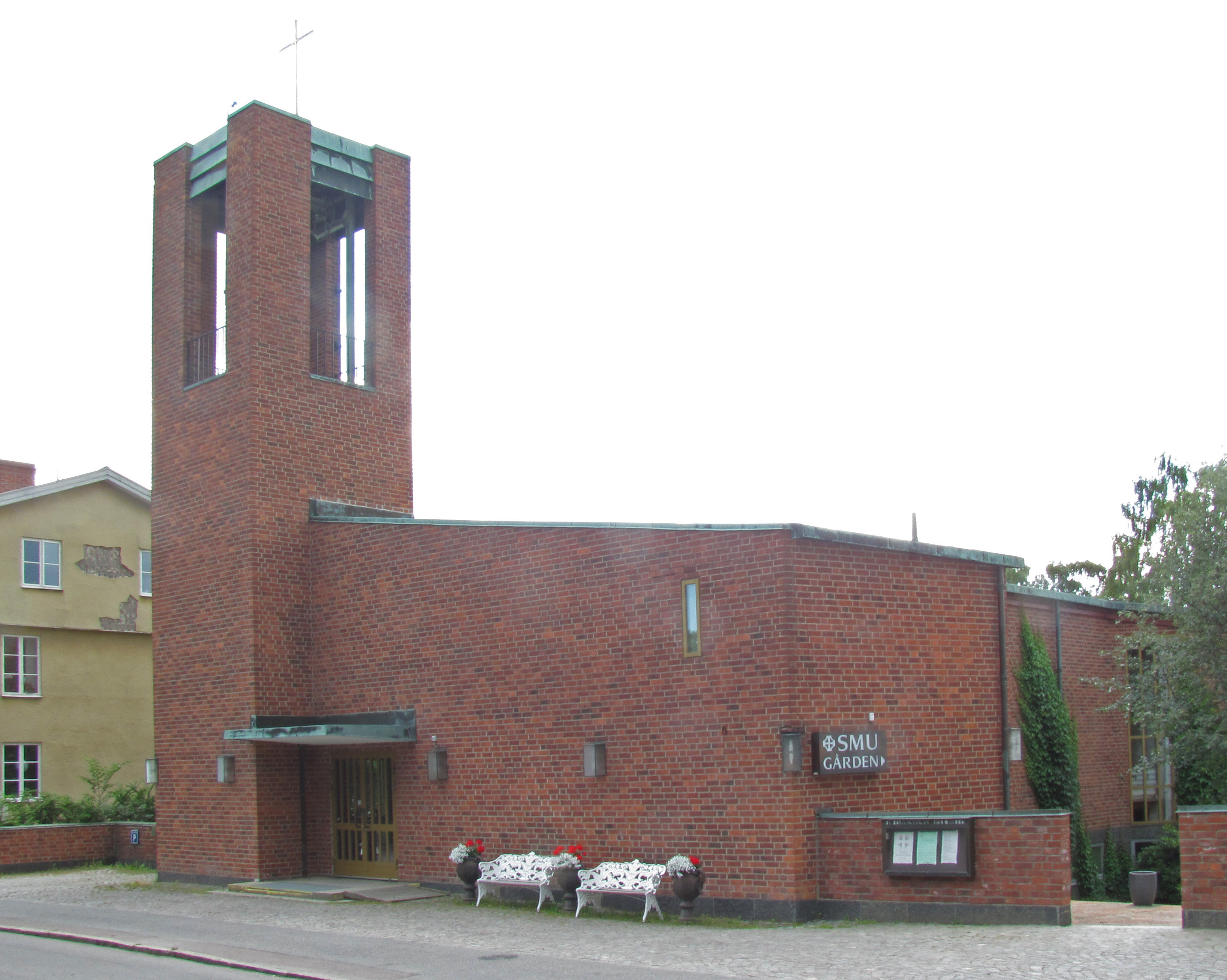 S:t Eskilskyrkan, Eskilstuna